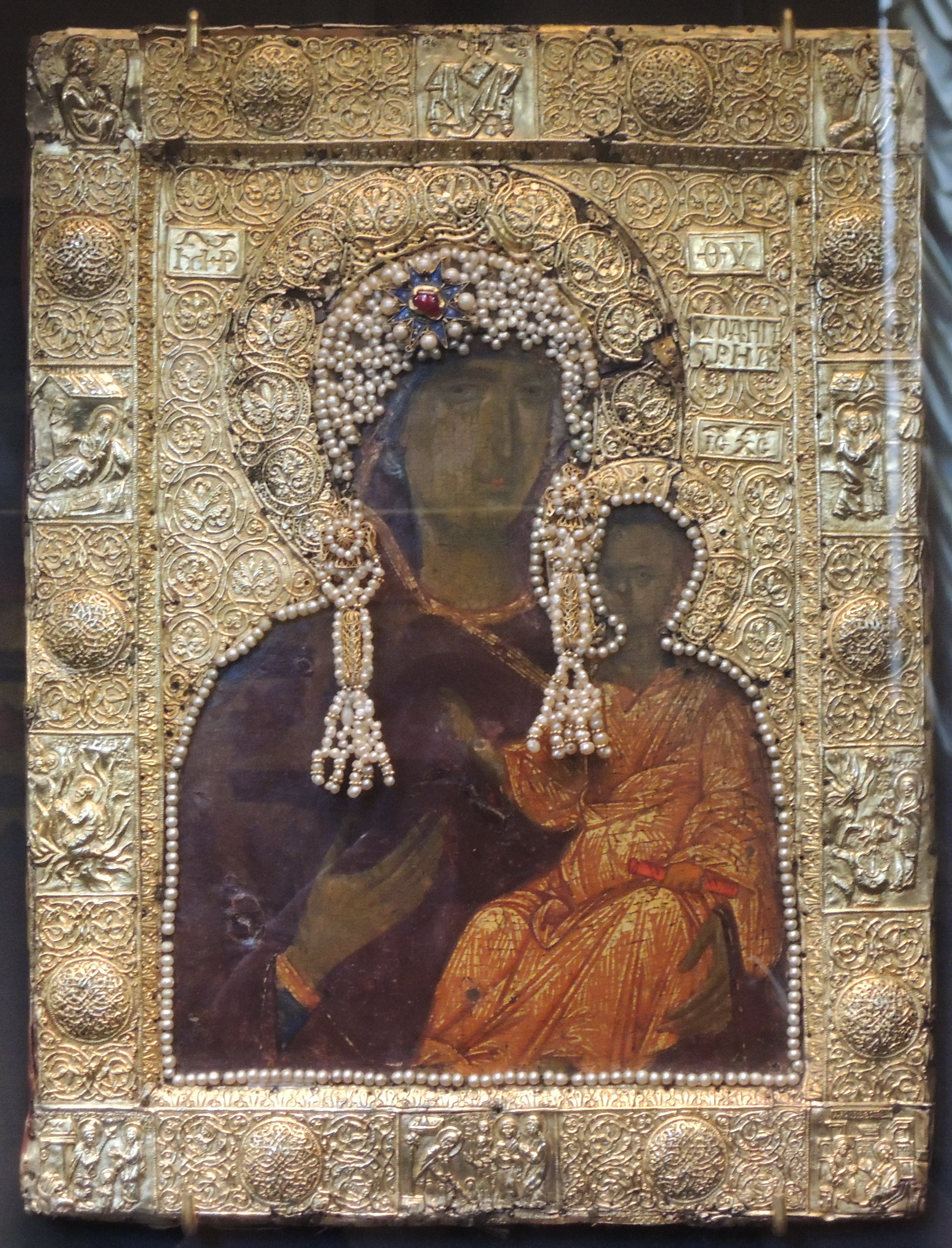 Икона в окладе "Богоматерь Одигитрия". Константинополь (?), первая треть 15 века; рясны - Византия или Балканы, 14 век; звезда на очелье - Западная Европа, вторая пол. 15 века; очелье - Мастерские Московского Кремля, середина 16 века. ММК Икона могла быть привезедна в Москву Софией Палеолог